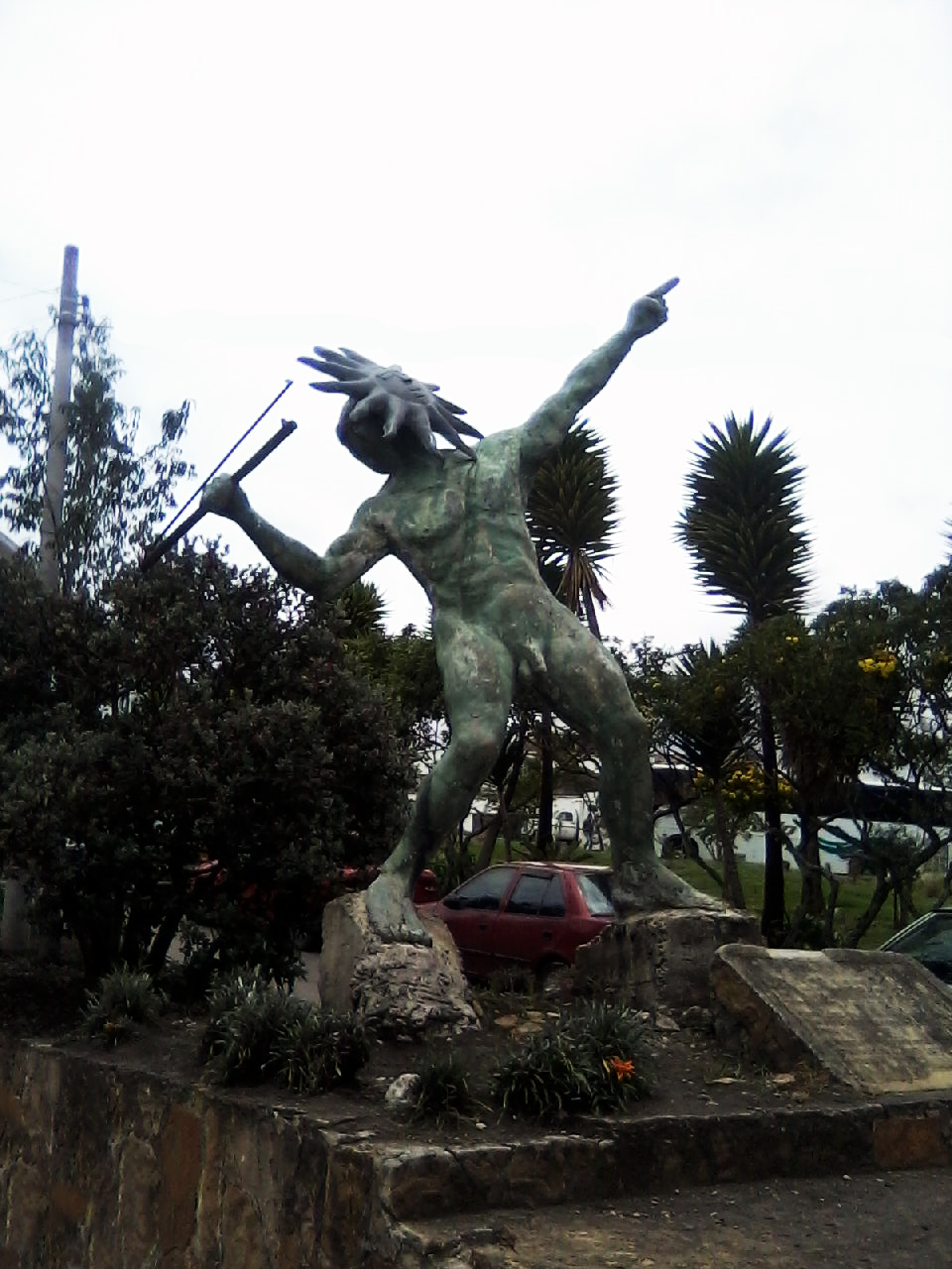 este monumento se encuentra en la universidad pedagógica y tecnológica de Colombia se trata de una leyenda mas o menos así La Leyenda de Goranchacha el profeta. Goranchacha era hijo del sol y de una doncella de Guachetá; al cumplir 24 años pasó a Ramiriquí y Sogamoso en donde fué recibido como hijo del sol. Recorrió las tierras chibchas recordando las enseñanzas de Bochica, la obligación de adorar a los dioses, venerar a los caciques, guardar la paz, etc. Cuando tuvo conocimiento del castigo brutal que hizo el cacique de Ramiriquí a uno de sus súbditos, le dió muerte, se apoderó del cacicazgo y se radicó en Hunza en donde ejerció el primer gobierno dictatorial. Hizo edificar un templo al sol con grandes piedras traídas de diversas regiones; este templo se hizo en el lugar que hoy ocupa la Universidad en Tunja. Según la tradición, Goranchacha profetizó la venida de una raza extraña, la cual esclavizaría al pueblo chibcha por haber olvidado las enseñanzas de Bochica.